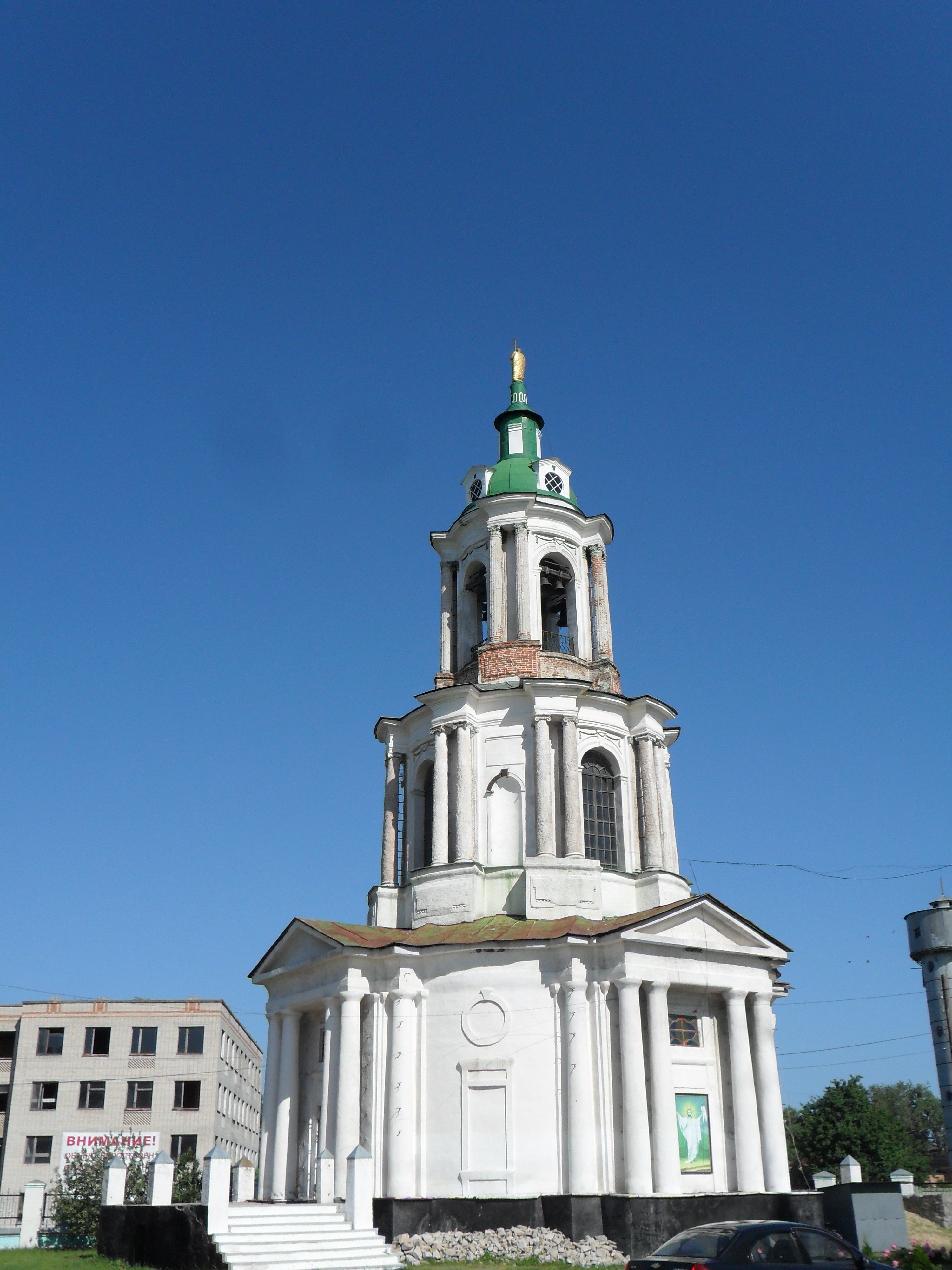 Охтирка